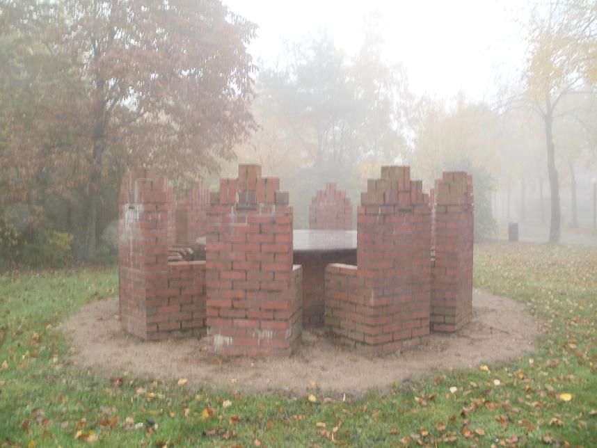 Gedenkstätte für 11 Widerstandskämpfer von Thomas Schütte in Hamburg-Niendorf(Nord) bestehend aus einem ovalen Granittisch, 12 gemauerten Stühlen und 11 Namensschildern aus Bronze.